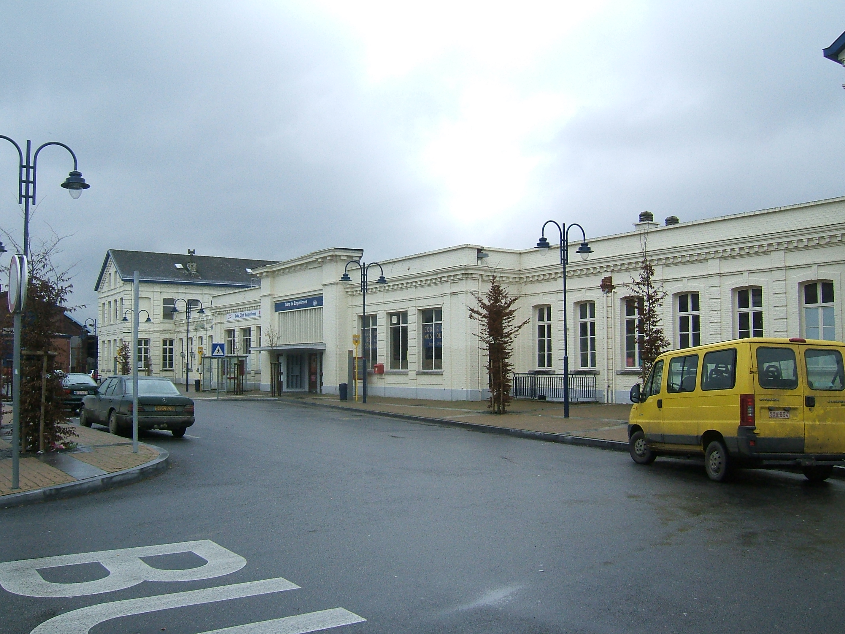 Ancien bâtiment voyageurs de la gare d'Erquelinnes en Belgique.